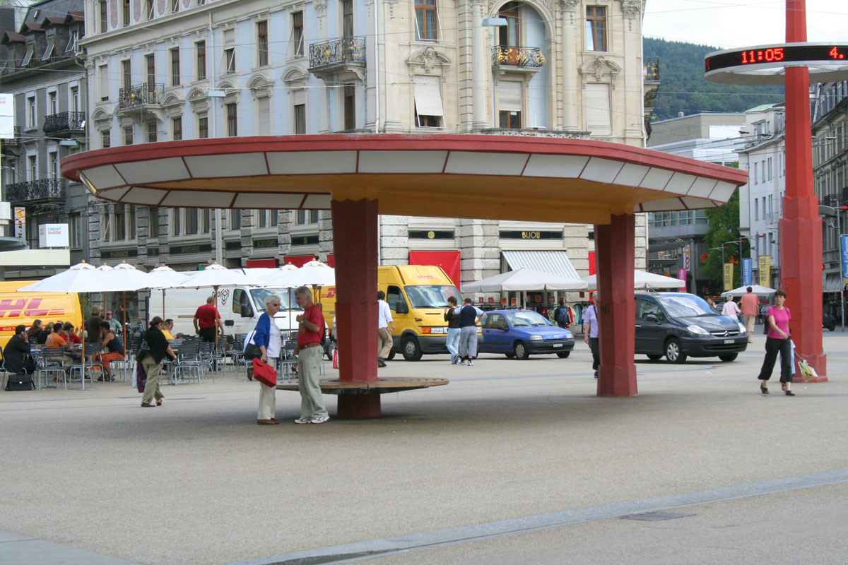 Tramwartehäuschen Zentralplatz Biel-Bienne